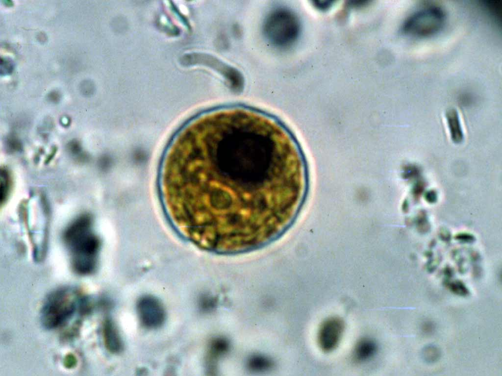 Chlamydomonas